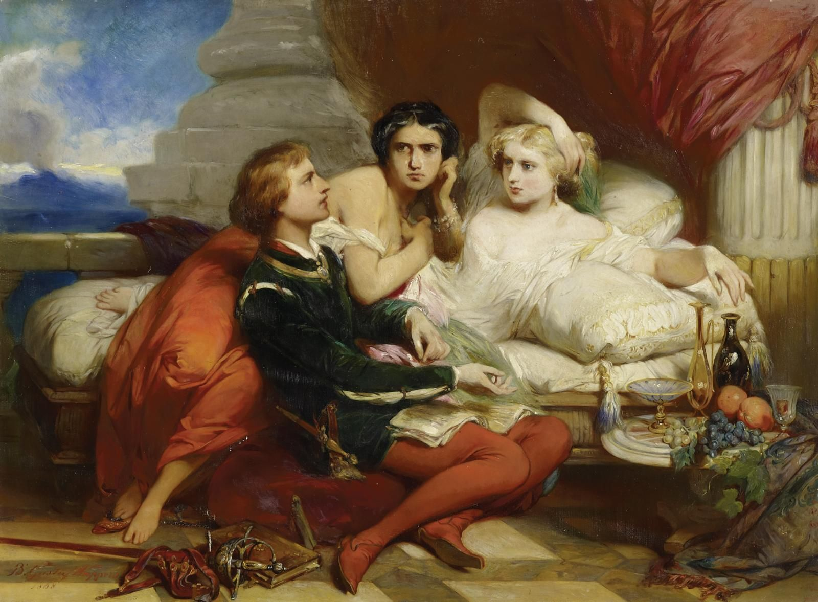 "Boccaccio liest Joanna von Neapel das Dekameron vor". Signiert und datiert unten links: B. Gustaaf Wappers 1868. Öl auf Holz. 54,5 x 74,5 cm